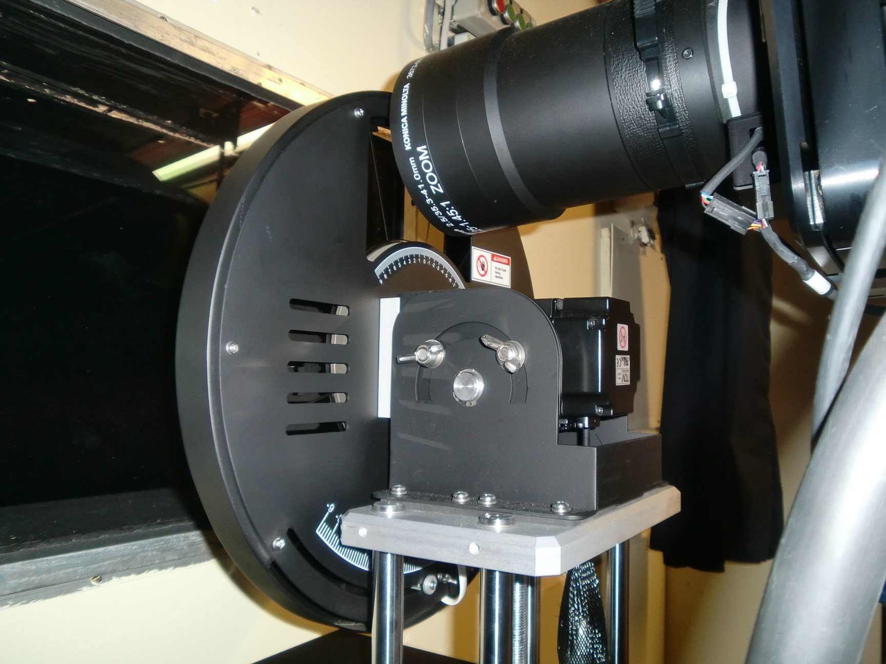 Digitaler Kinoprojektor Christie (Polarisationsrad)